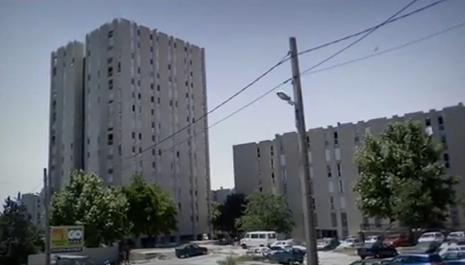 Vue d'une partie de la cité de La Castellane, dans le quartier Verduran et le 15e arrondissement de Marseille, depuis le boulevard Henri Barnier (bordant le quartier Saint-André et du 16e arrondissement).